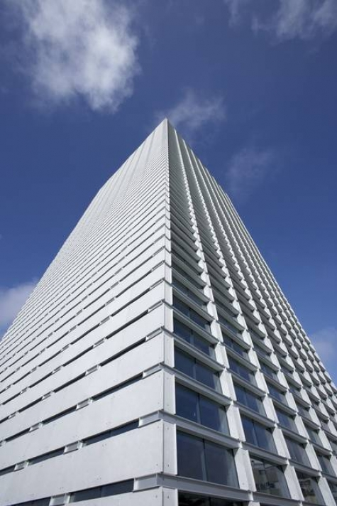 Situado en Avda. Boavista, el edificio fue diseñado por el arquitecto Eduardo Souto de Moura.Constructor: Grupo San José. Promotor: Burgo Fundiários.